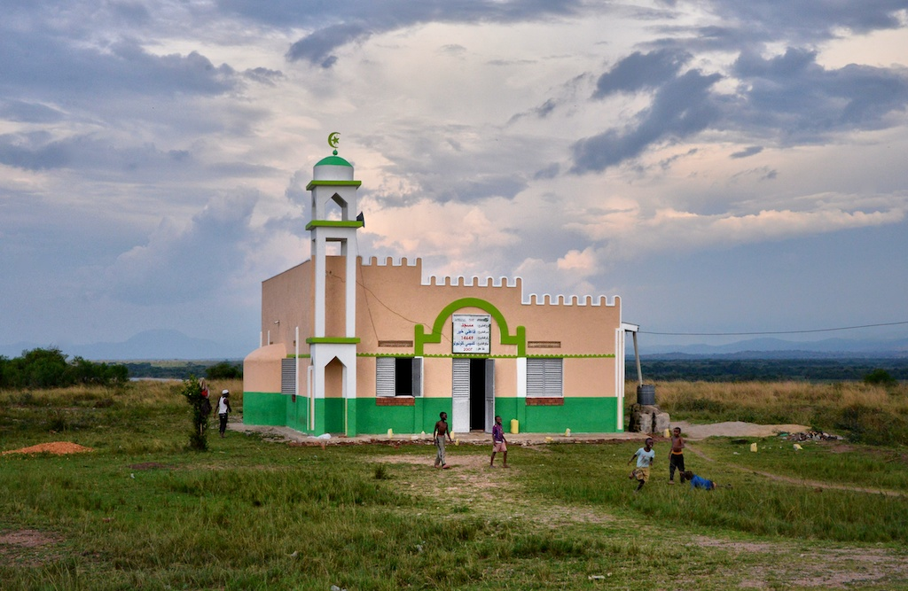 Rural Mosque, Uganda